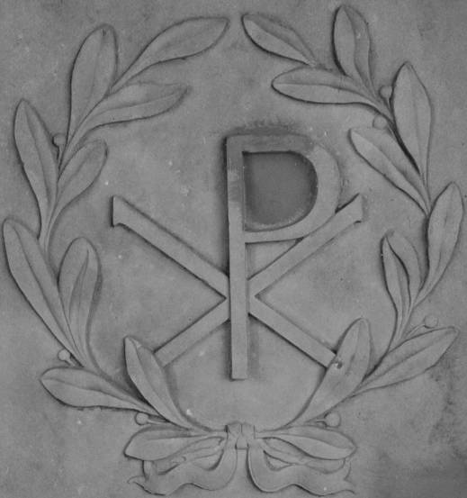 Christusmonogramm auf einen Grabmal auf dem Friedhof am Mühlenberg in Eckernförde